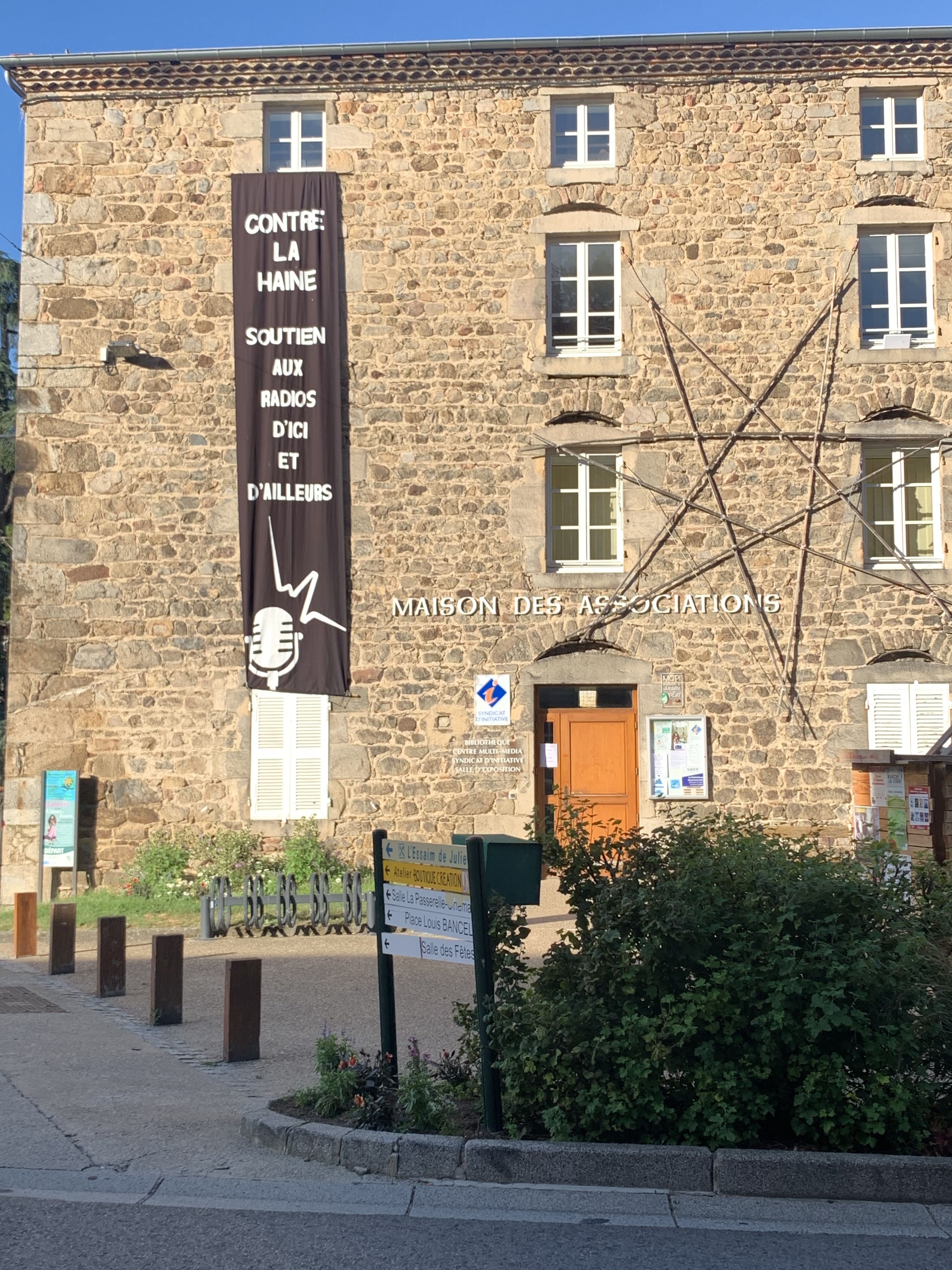 Maisons des associations de Saint-Julien-Molin-Molette (juillet 2020) avec banderole de soutien à Radio d'ici.